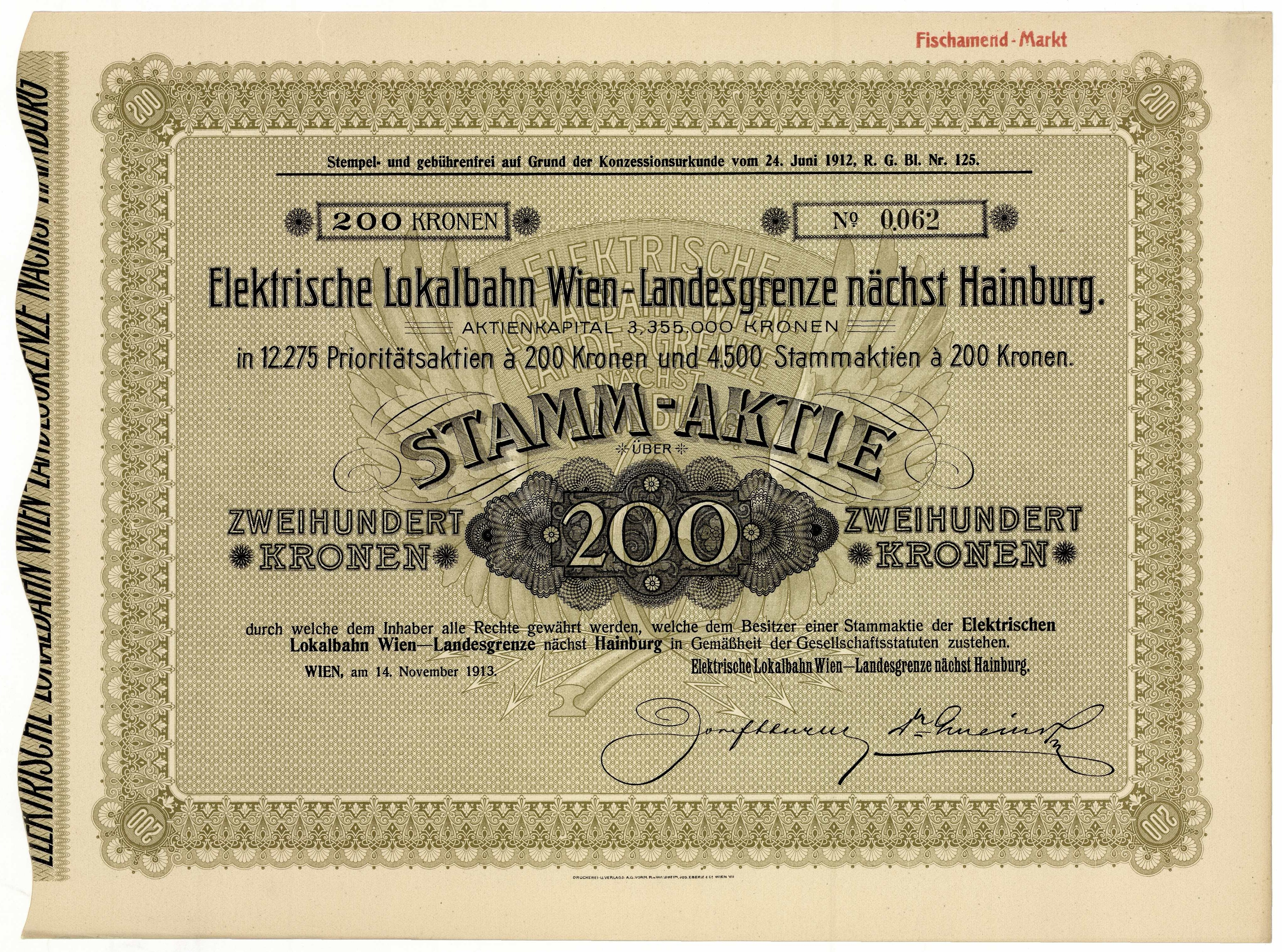 Aktie über 200 Kronen der Elektrischen Lokalbahn Wien-Landesgrenze nächst Hainburg vom 14. November 1913